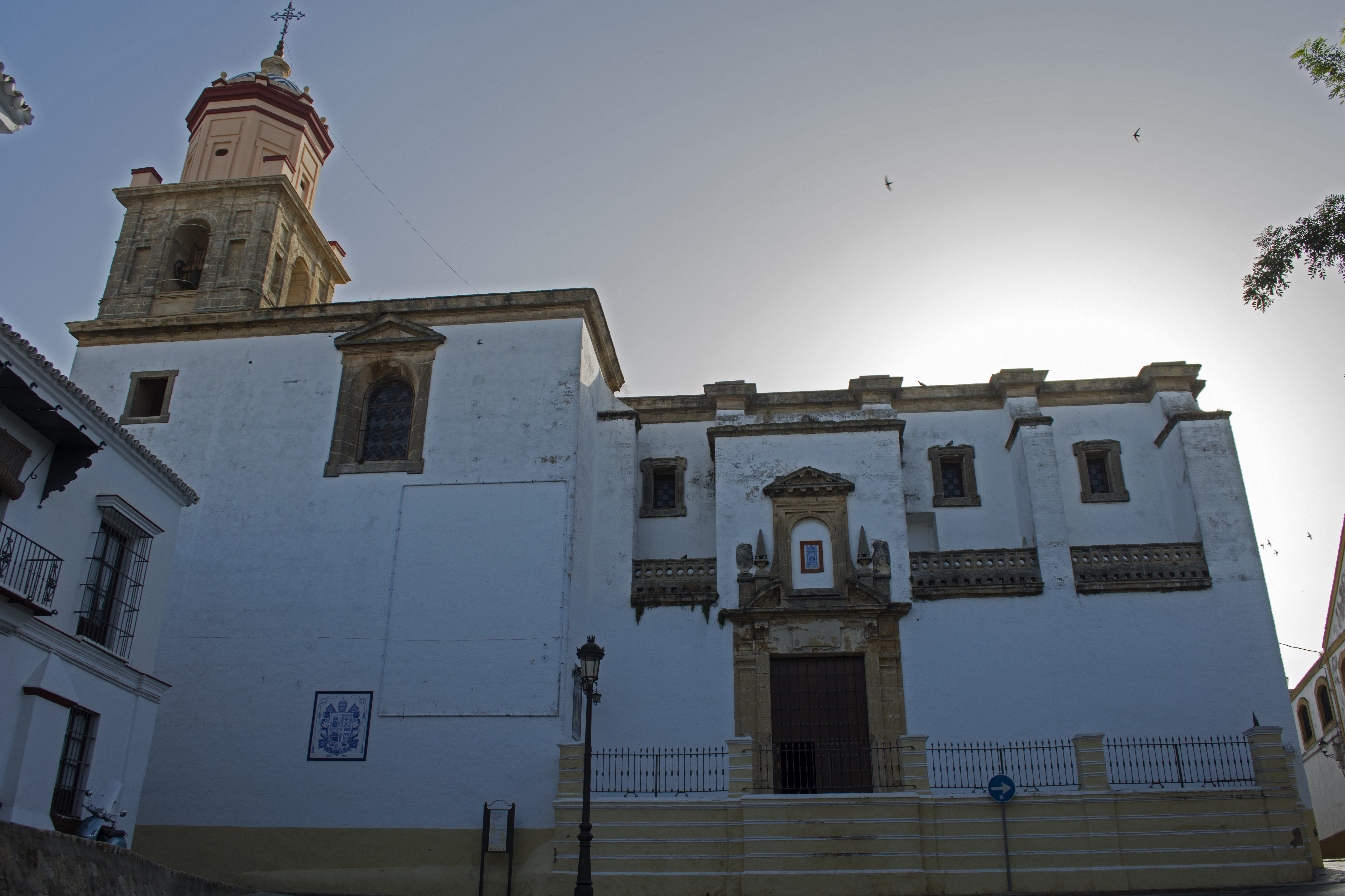 Santuario de Nuestra Señora de la Caridad, Sanlúcar de Barrameda. Arquitecto Alonso de Vandelvira.